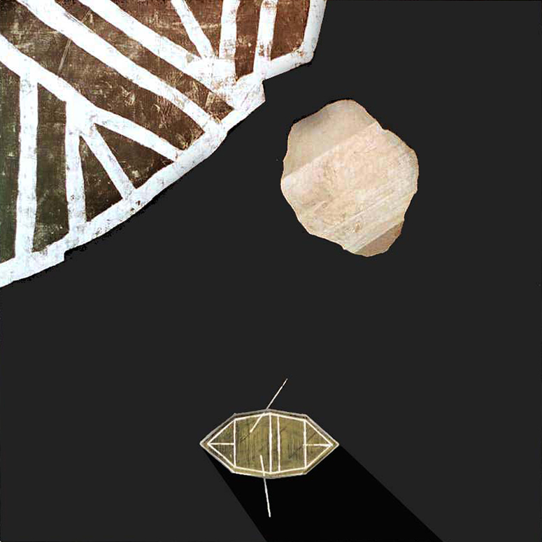 Sissel Gregers